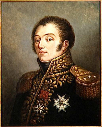 Le général Jean-Pierre Firmin Malher (1761-1808)